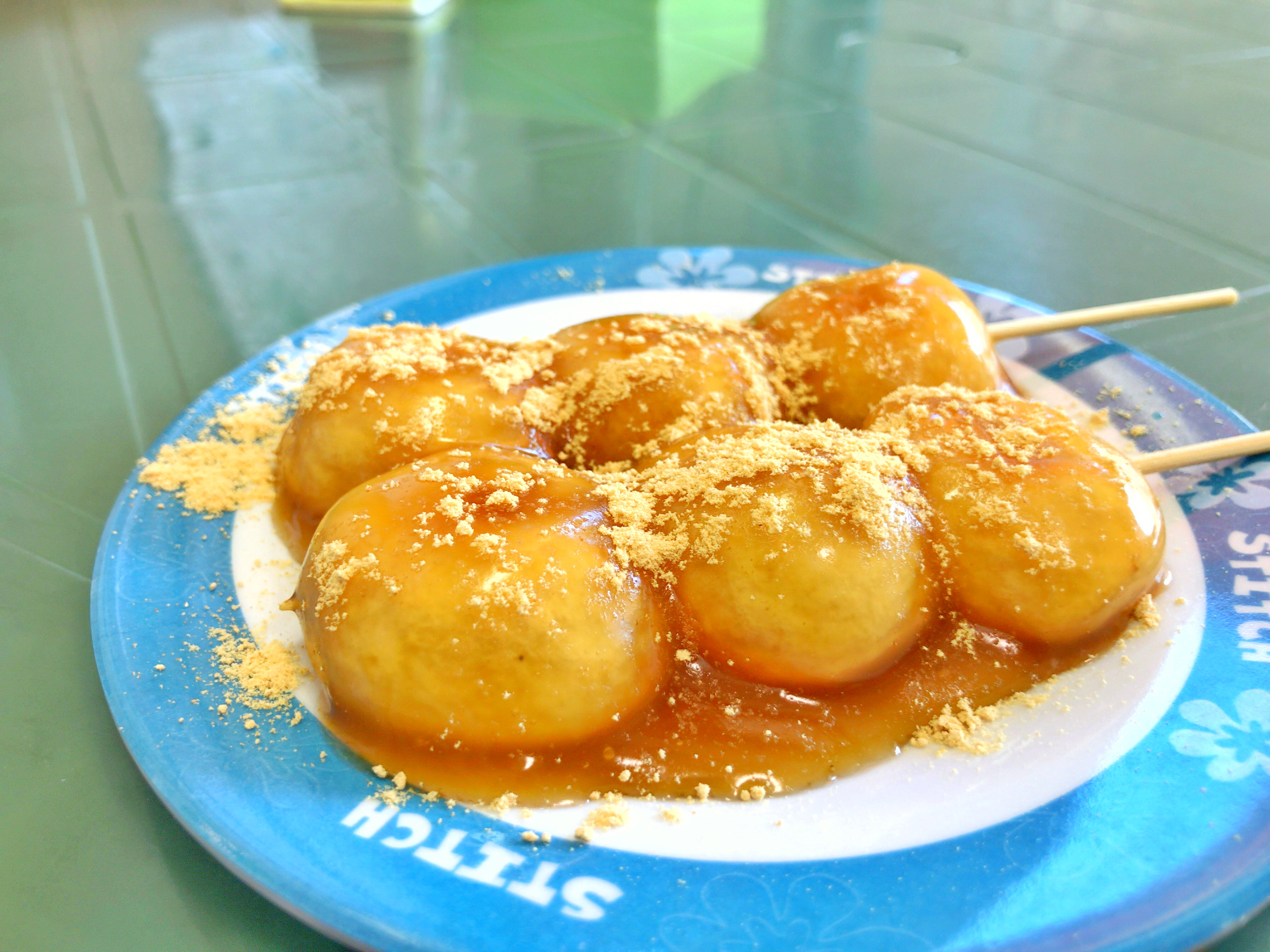 味の店たかはし